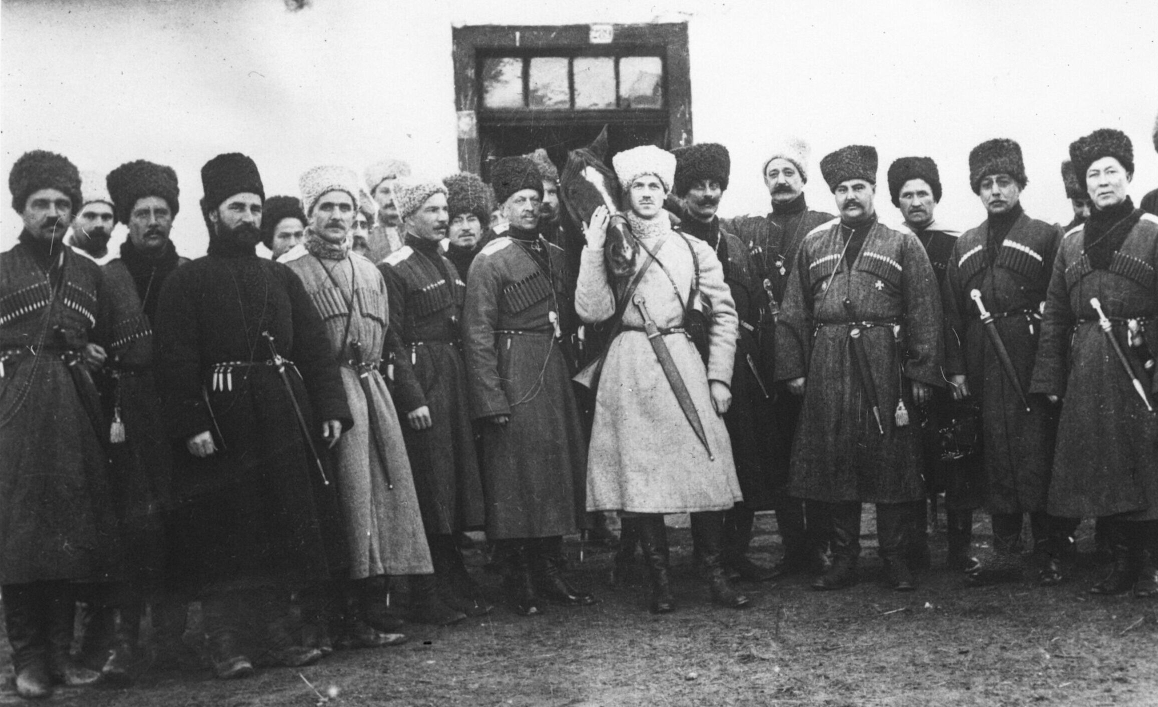 Le grand-duc Michael Alexandrovitch, frère du tsar, dans les Carpathes [Carpates] : [photographie de presse] / [Agence Rol]